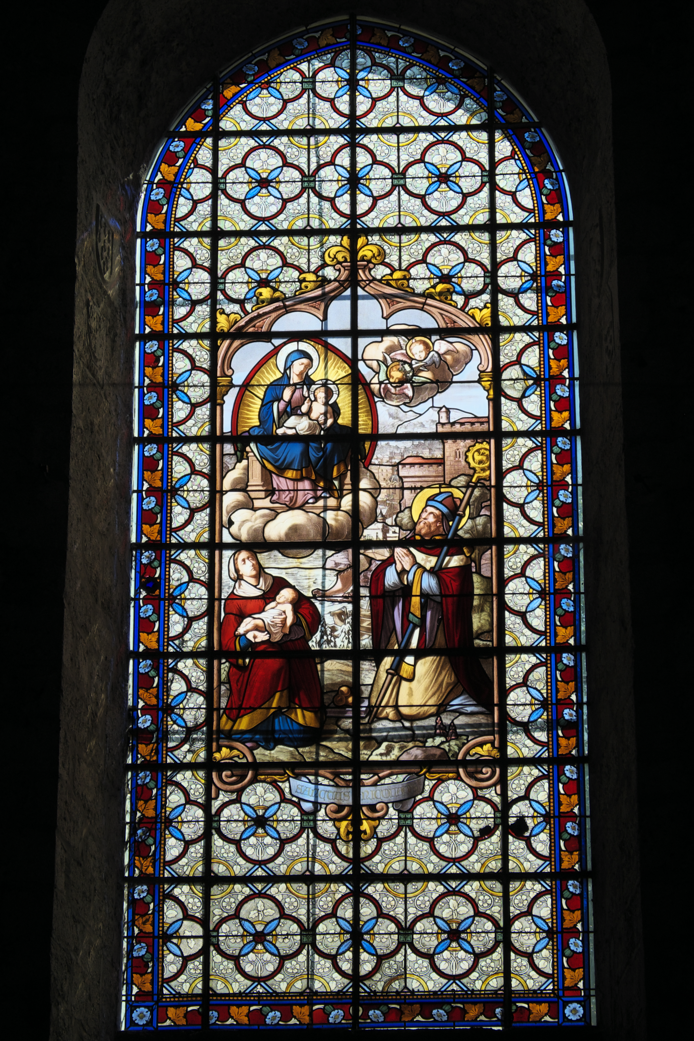 Katholische Pfarrkirche Saint-Nicolas in Saint-Arnoult-en-Yvelines im Département Yvelines (Region Île-de-France/Frankreich), Bleiglasfenster im Chor; Darstellung: Heiliger Nikolaus, Madonna mit Kind